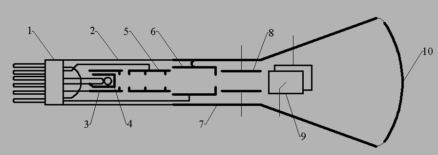 1 - цоколь; 2 - баллон; 3 - управляющий электрод; 4 - активный слой; 5 - первый анод; 6 - второй анод; 7 - аквадаг; 8 - отклоняющие Y-пластины; 9 - отклоняющие Х-пластины; 10 - экран с люминофором